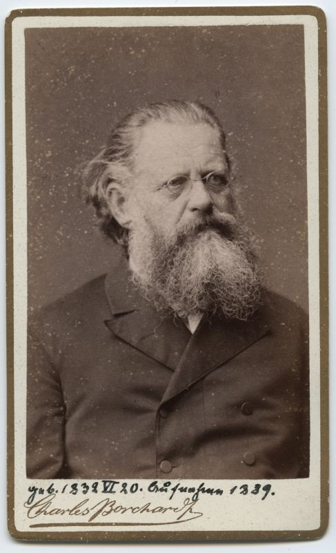 Ferdinand Gebhardt (AM F 13812)